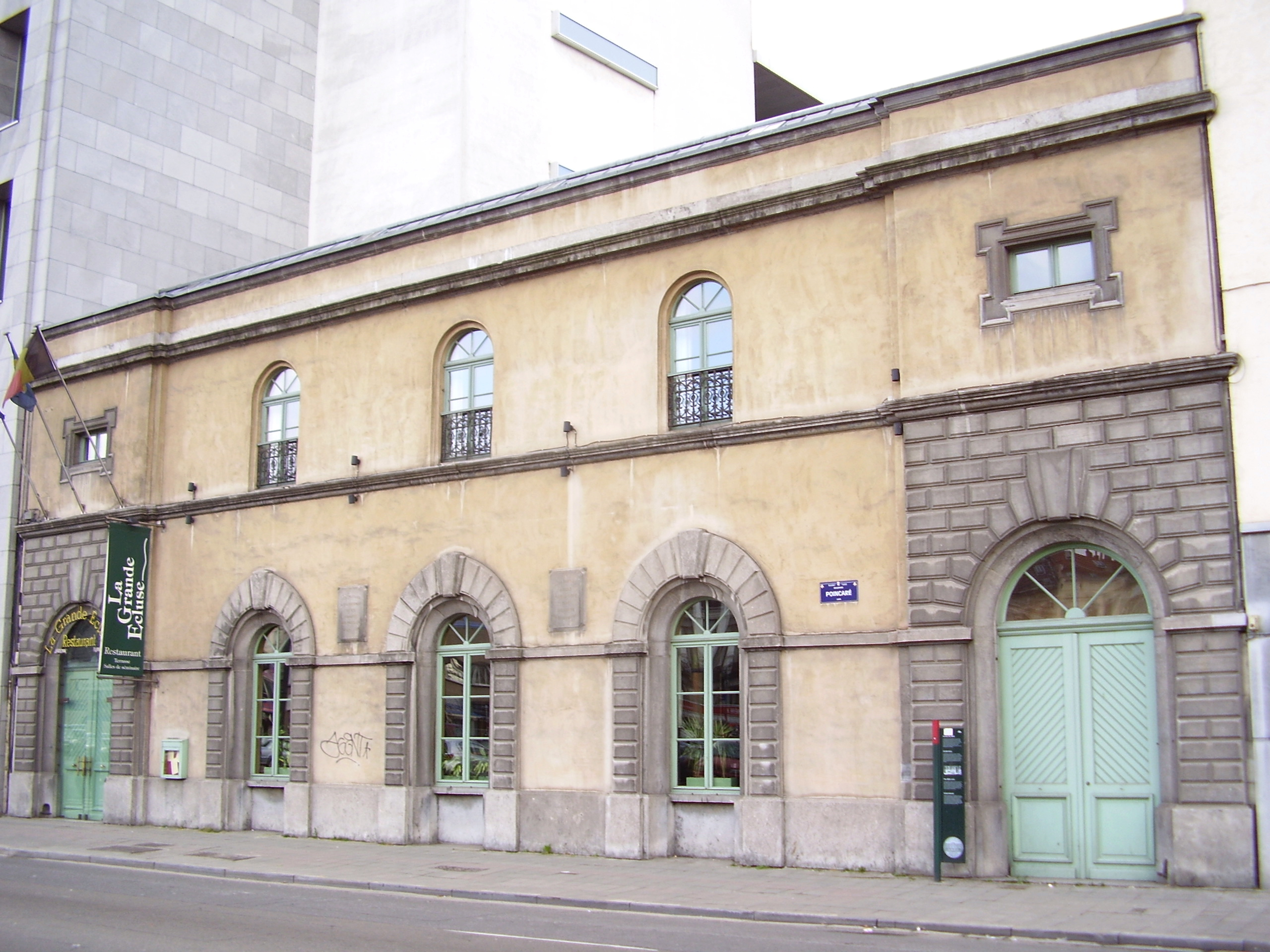 Bâtiment abritant le mécanisme de la grande Écluse de la Senne, reconstruit par Léon Suys en 1868-1871, Bruxelles